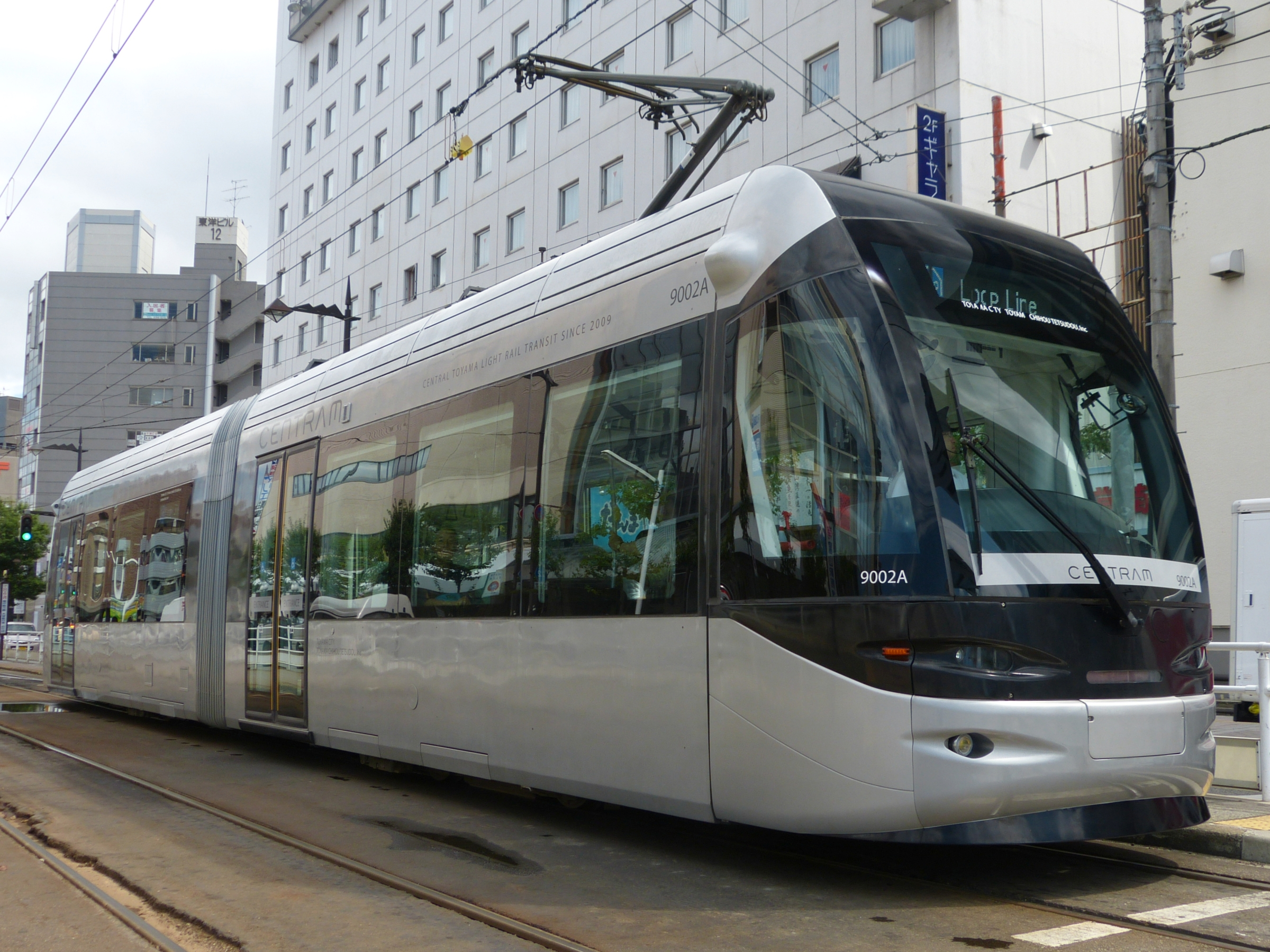 富山地方鉄道9000形電車(セントラム)